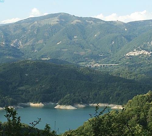 Panorama di Petrella Salto, il Cicolano e il Lago artificiale del Salto